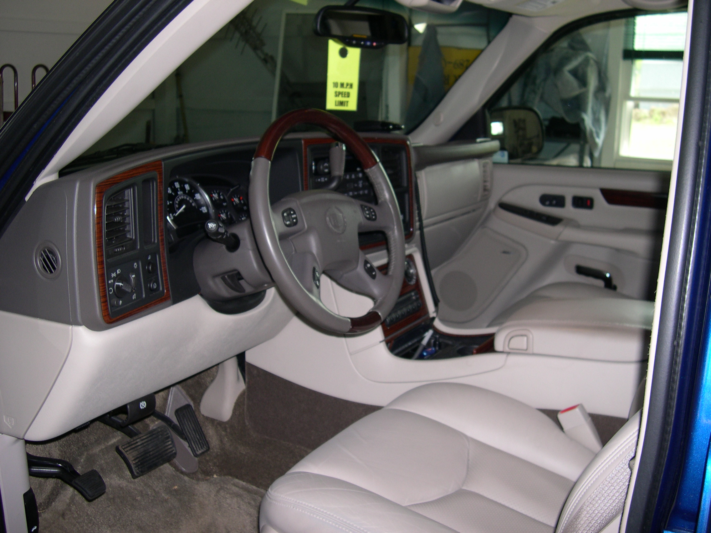 2003 Cadillac Escalade EXT